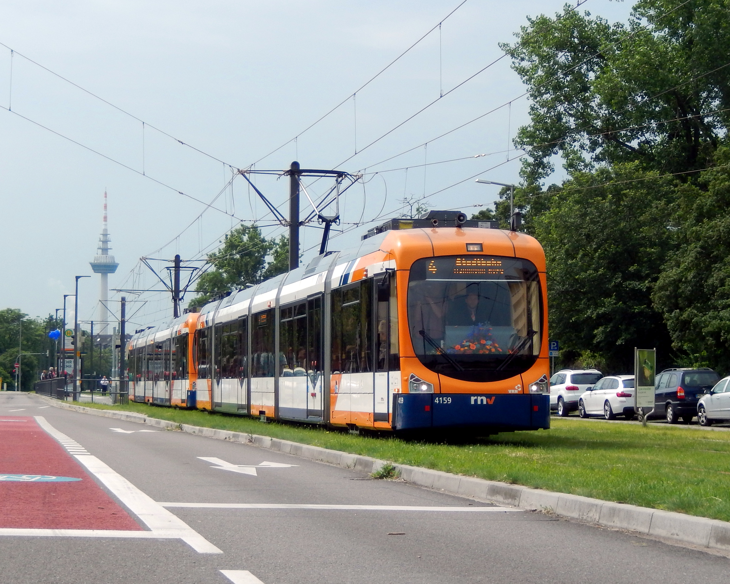 RNV6ZR 4159 und 4158 bei der Eröffnungsfahrt der Stadtbahn Nord. Hier kurz vor dem Abbiegen in den Ulmenweg, also kurz hinter der Haltestelle Herzogenriedstraße.